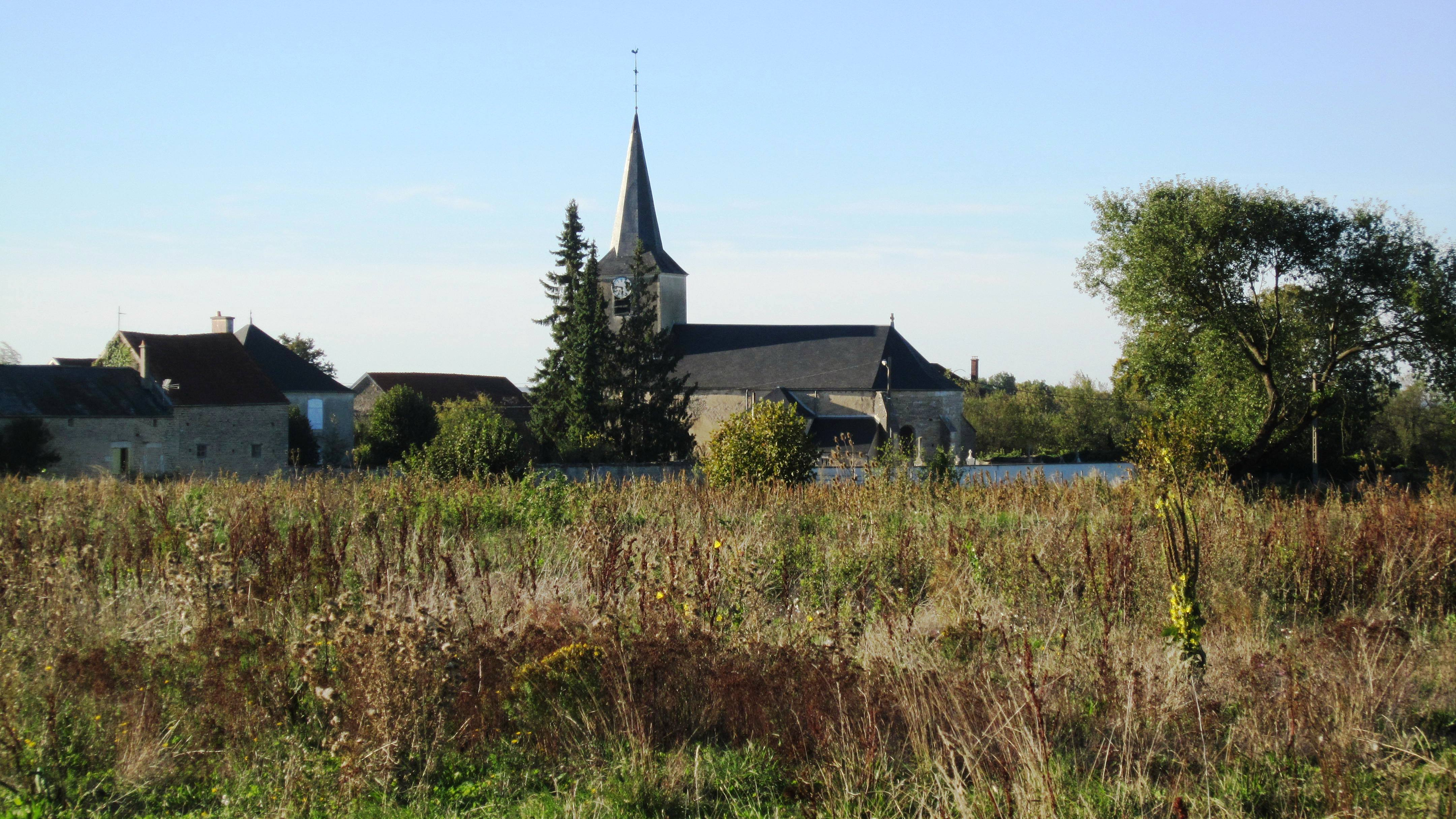 Fontaines-les-Sèches (Côte-d'Or)